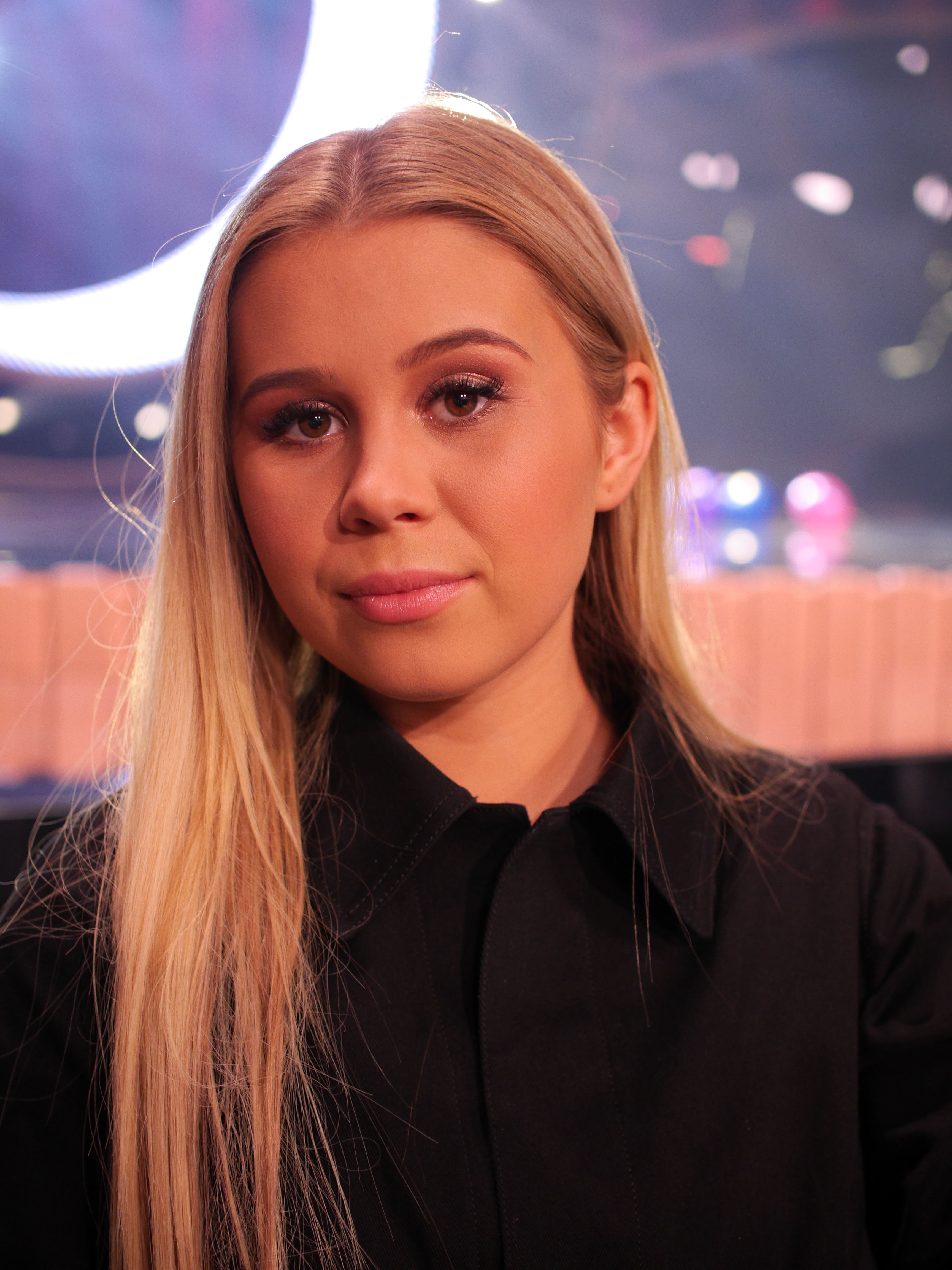 Melodifestivalen 2019 i Lidköping